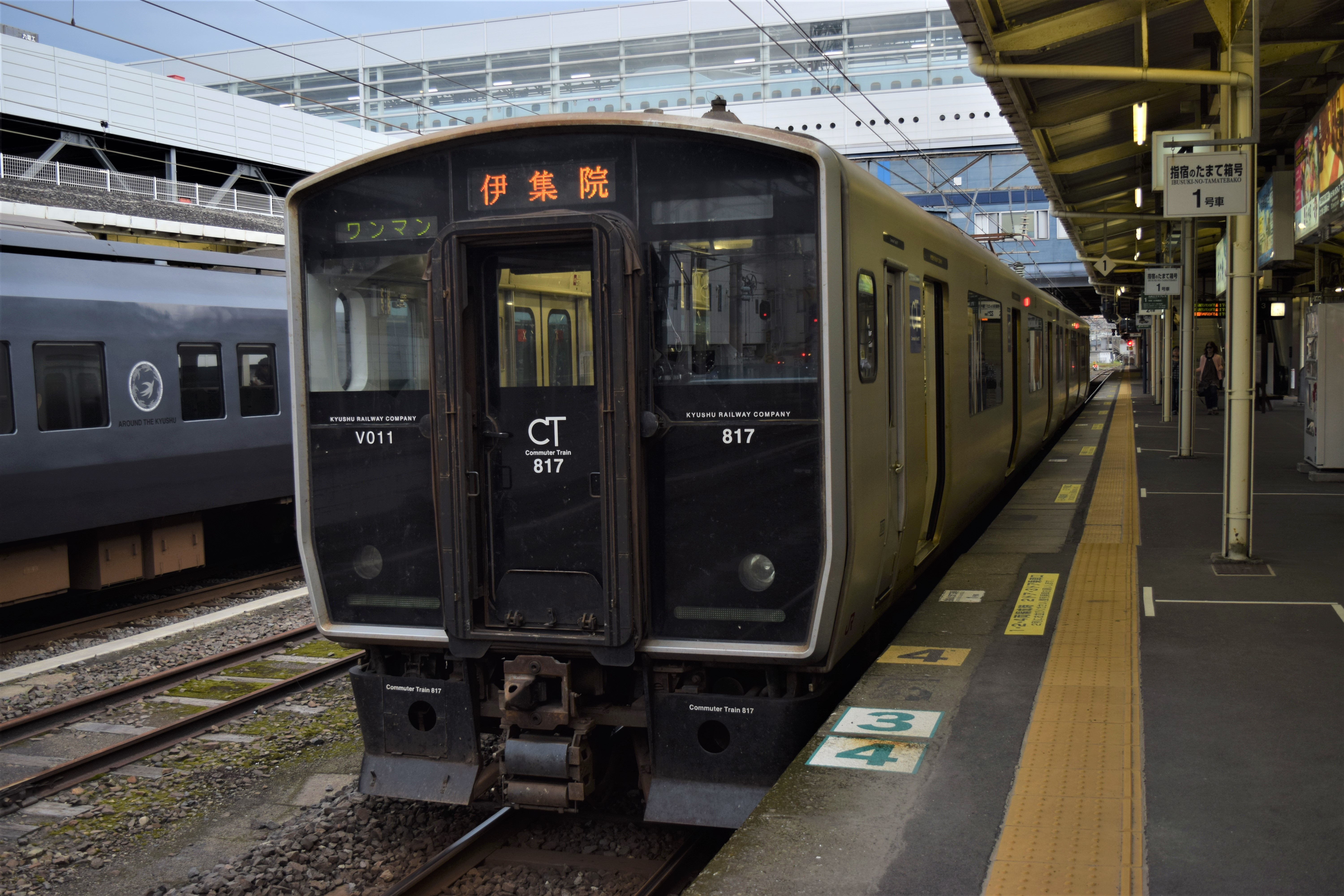 JR九州817系電車(0番台、鹿児島所属) Nikon D3300